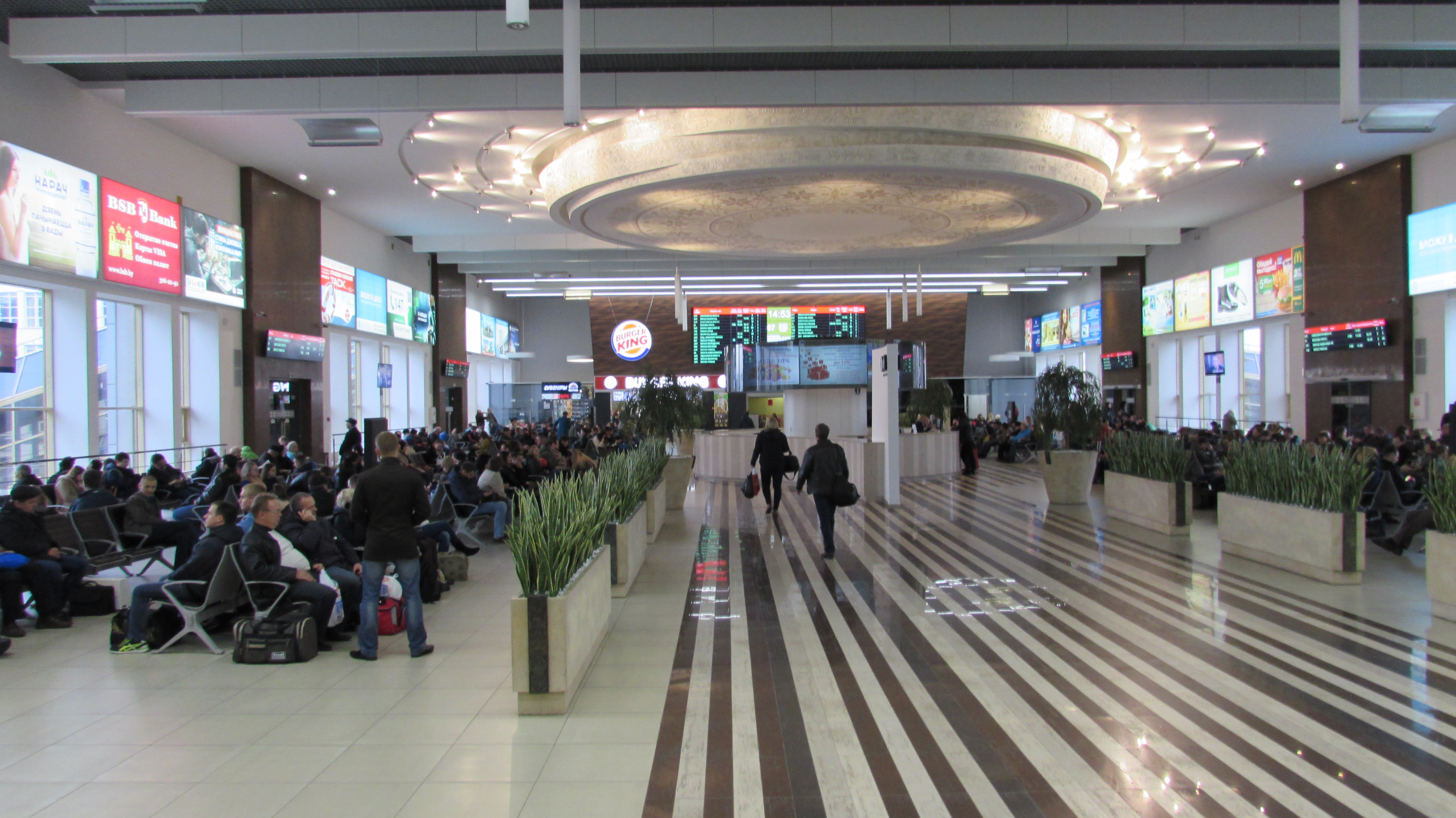 MinskHauptbahnhof PassaschyrskiWarteraum